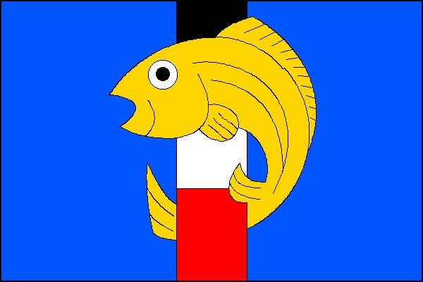 Vlajka obce Slavětín nad Metují